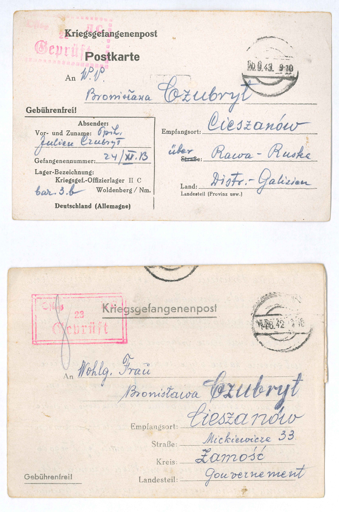 Listy z oflagu